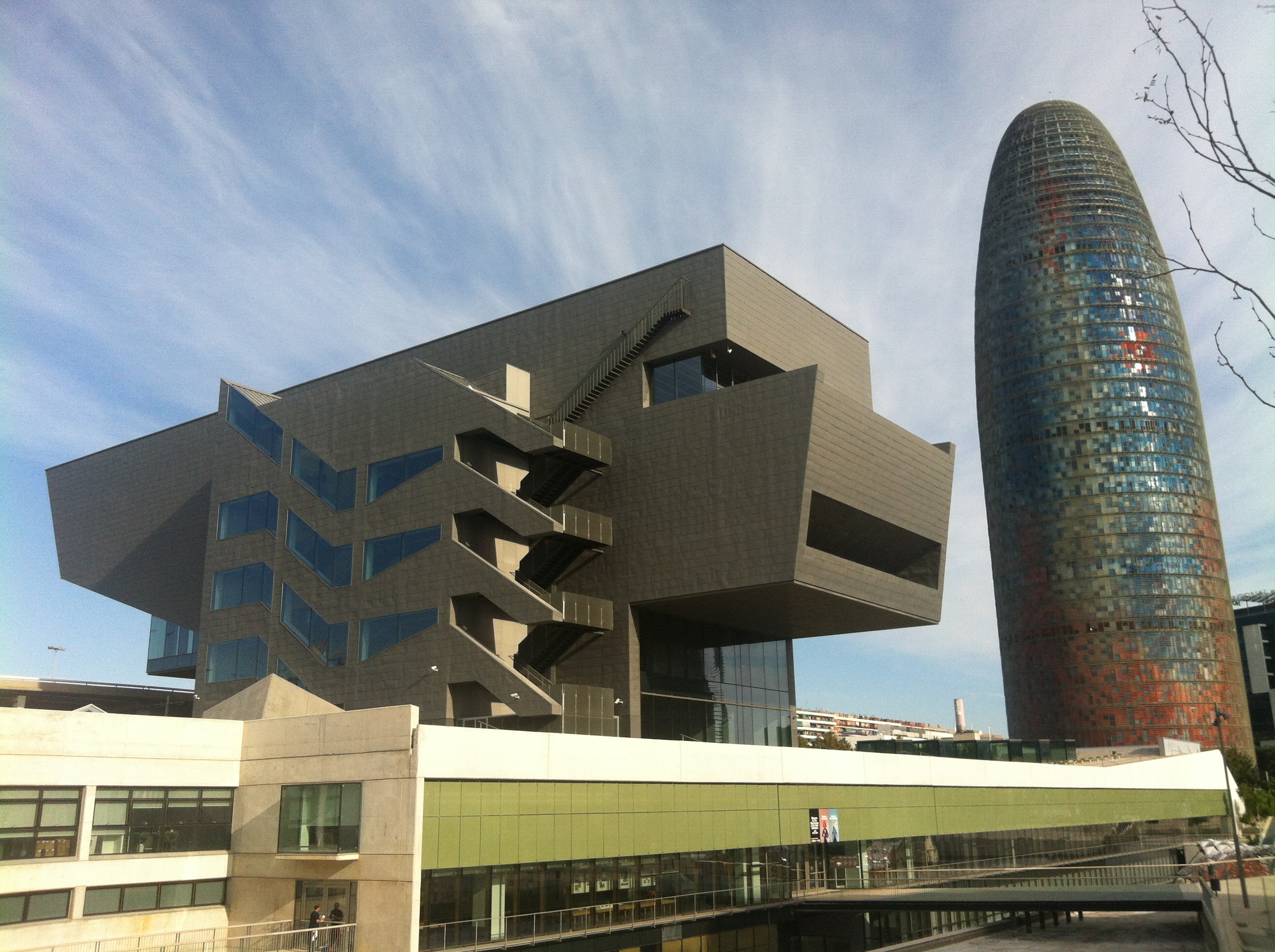 DHUB Barcelona november 2013 (2)